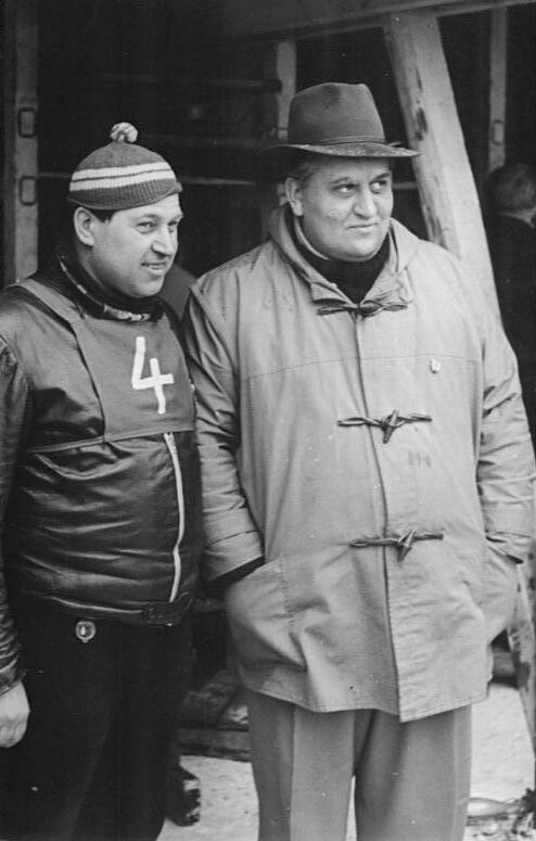 Fritz Kuhn, Oswald Schelter Zentralbild Quasch. 16.2.1953 IV. Wintersportmeisterschaften der Deutschen Demokratischen Republik für Frieden, Einheit, Demokratie und Sozialismus vom 10.-15.2.1953 in Oberhof UBz: Olympiasieger Fritz Kuhn aus Westdeutschland (rechts) und Schelter, der Bremser des Bobmeisters der Deutschen Demokratischen Republik Erich Hansen. Viererbob-Meisterschaften. Abgebildete Personen: Hansen, Erich: Rodelsportler, DDR